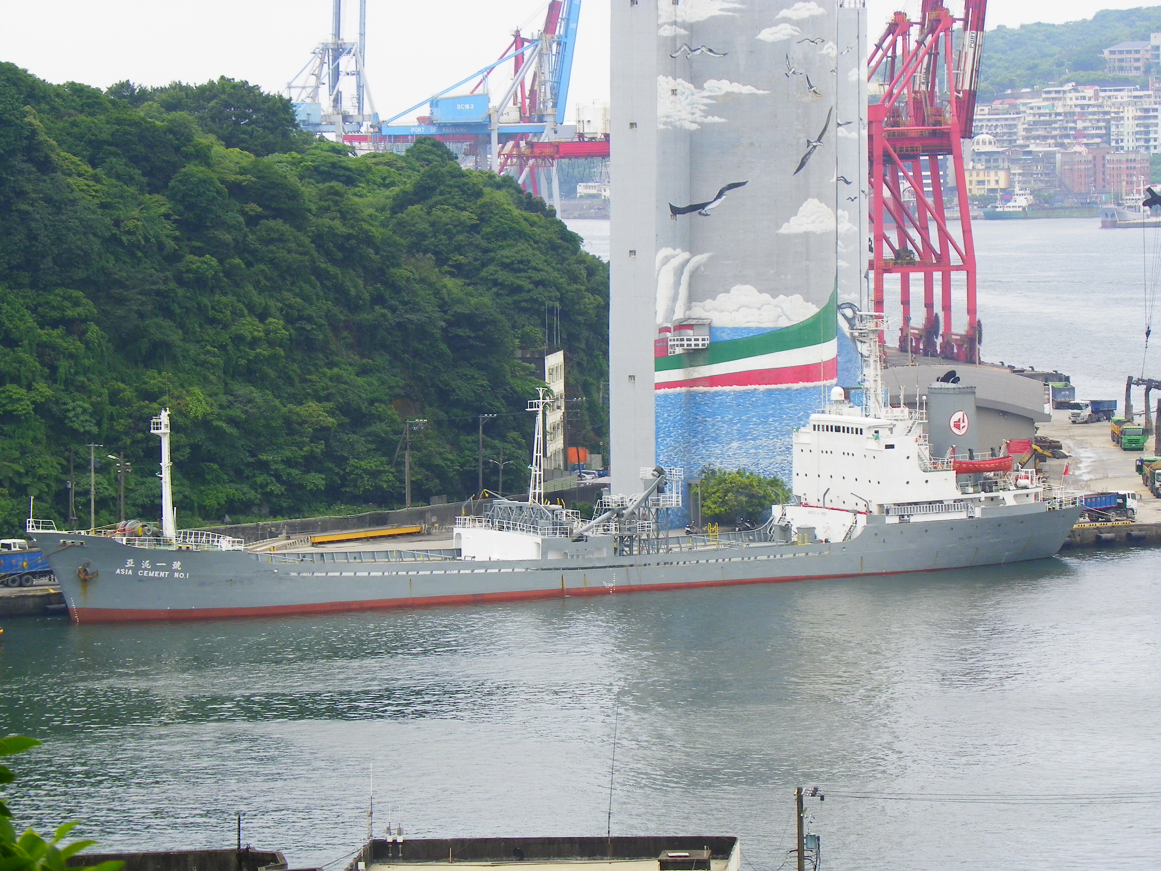 中文（台灣）: 停泊於基隆港西12B碼頭的亞東集團裕民海運中華民國籍水泥船亞泥一號（3917總噸）。